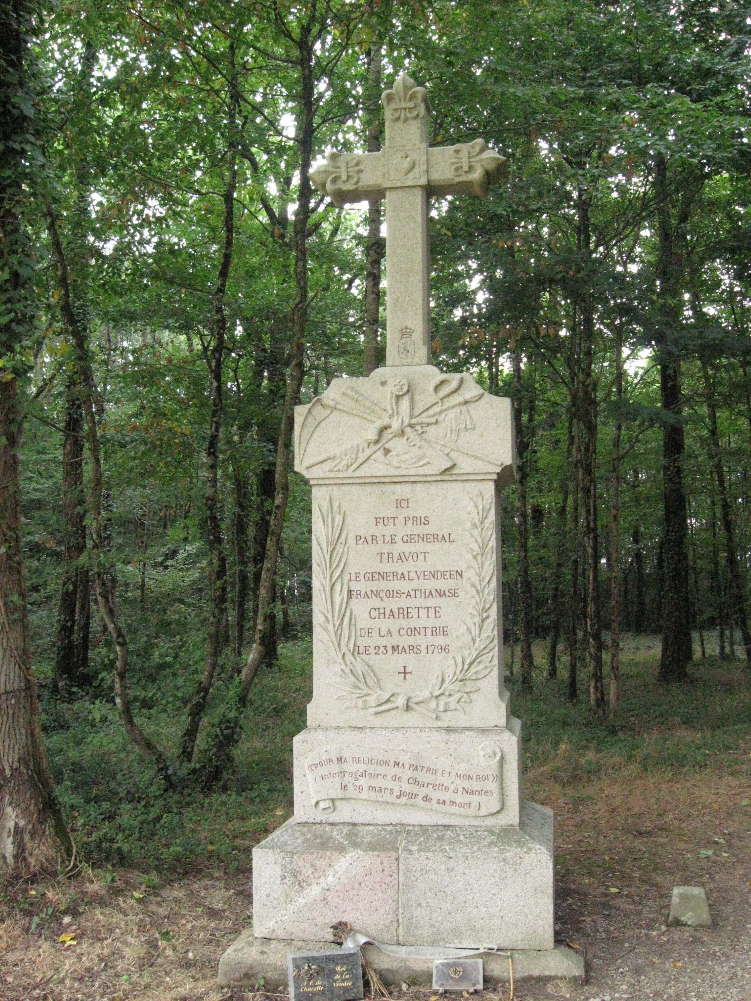 Monument signalant le lieu de capture de François-Athanase de Charette de la Contrie en 1796